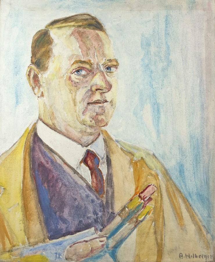 Alfred Helberger - Selbstbildnis, 1928. Oil on canvas; H 60.5 cm, W 50 cm